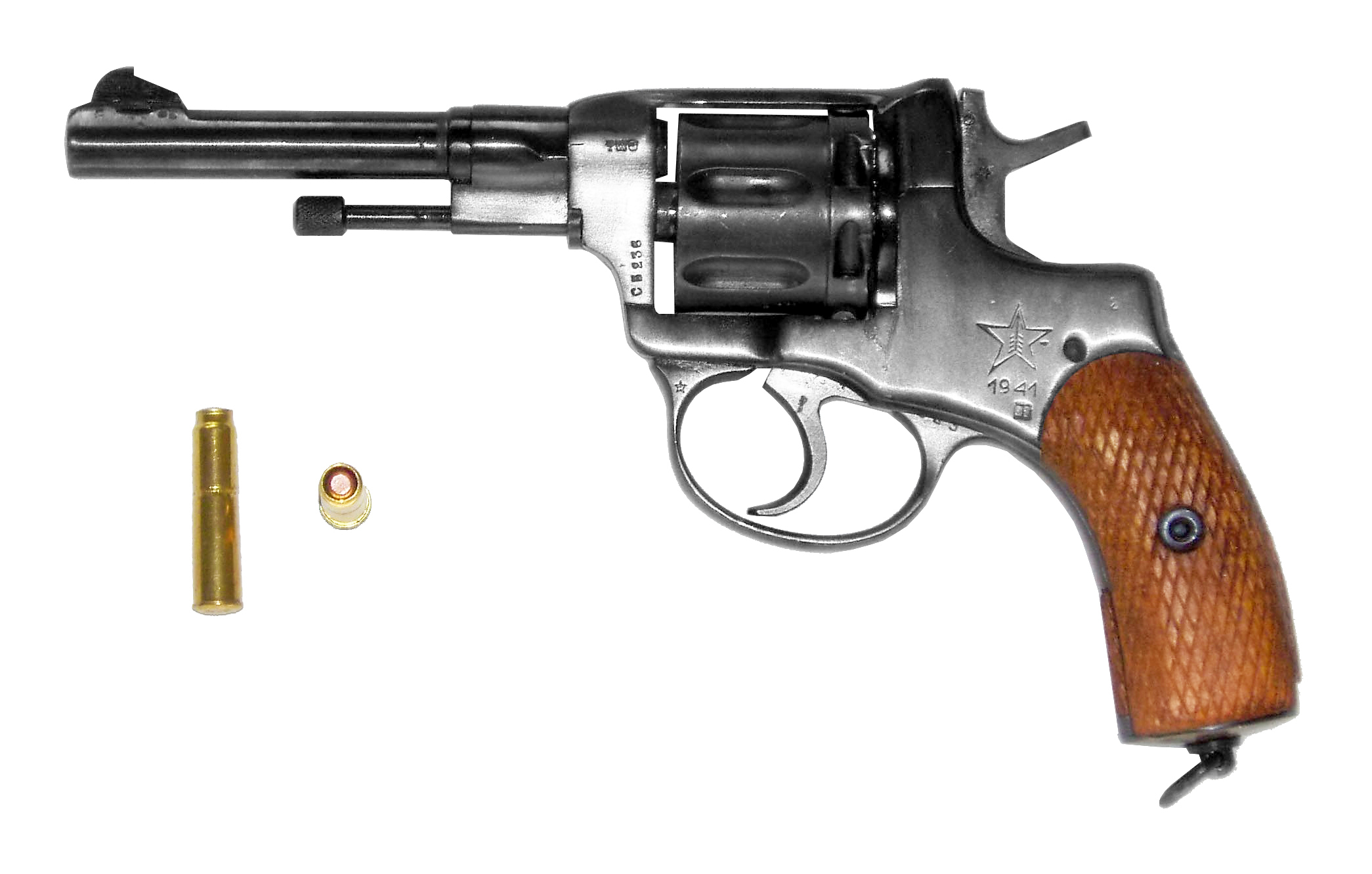 Nagant Revolver, 1941 zu Tula produzéiert, oppoléiert, mat zwou 7,62×38R Patrounen. Seriennummer banaliséiert.